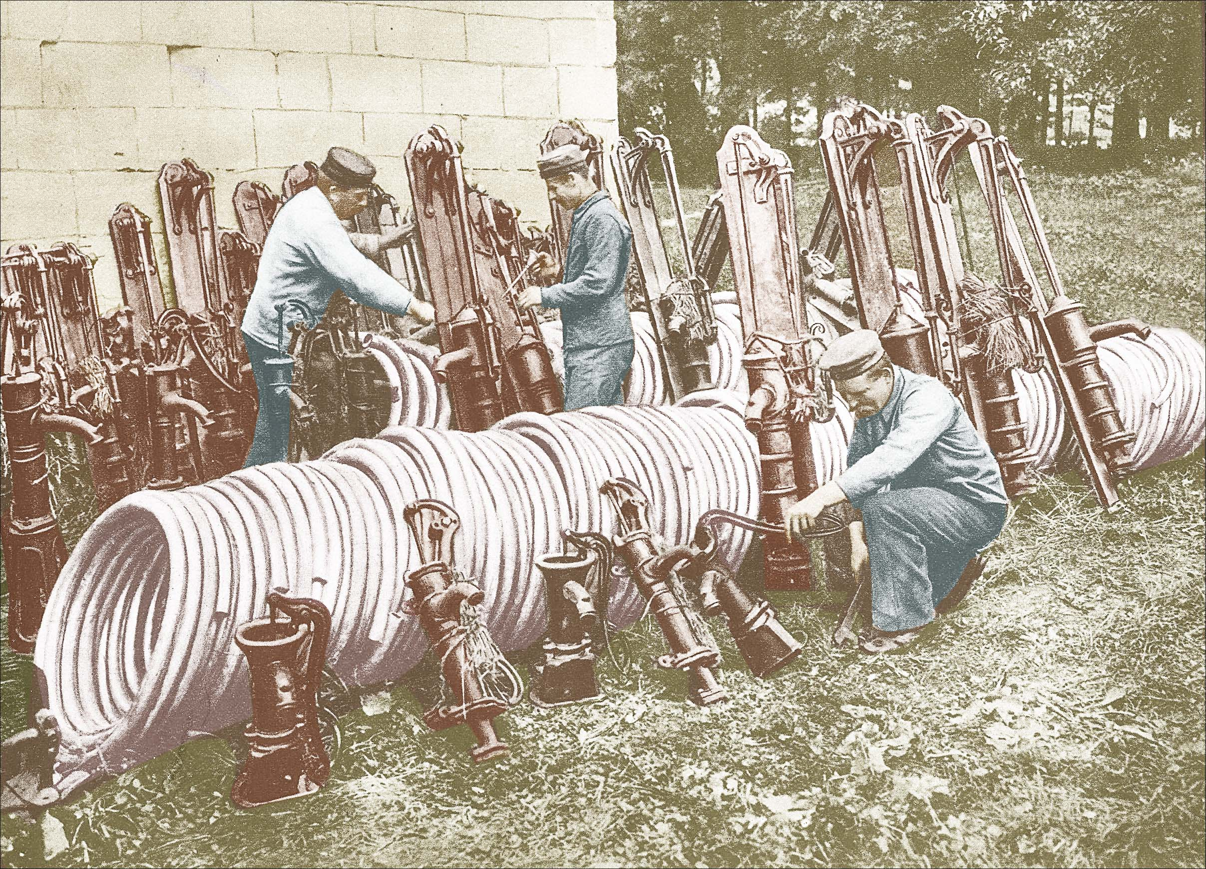 Plumbers at work on the 1915 western theatre of War.